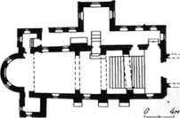 Миколаївська церква (Кілія): план